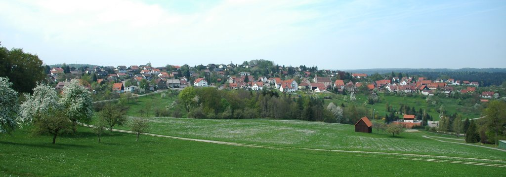 Großerlach Südsicht